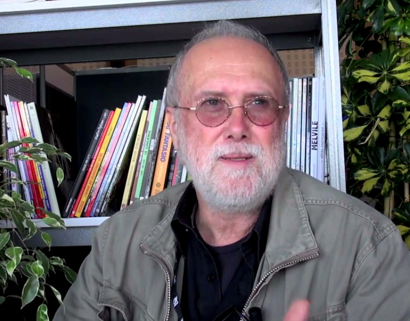 Luiz Eduardo de Oliveira au festival Quais Des Bulles en 2013